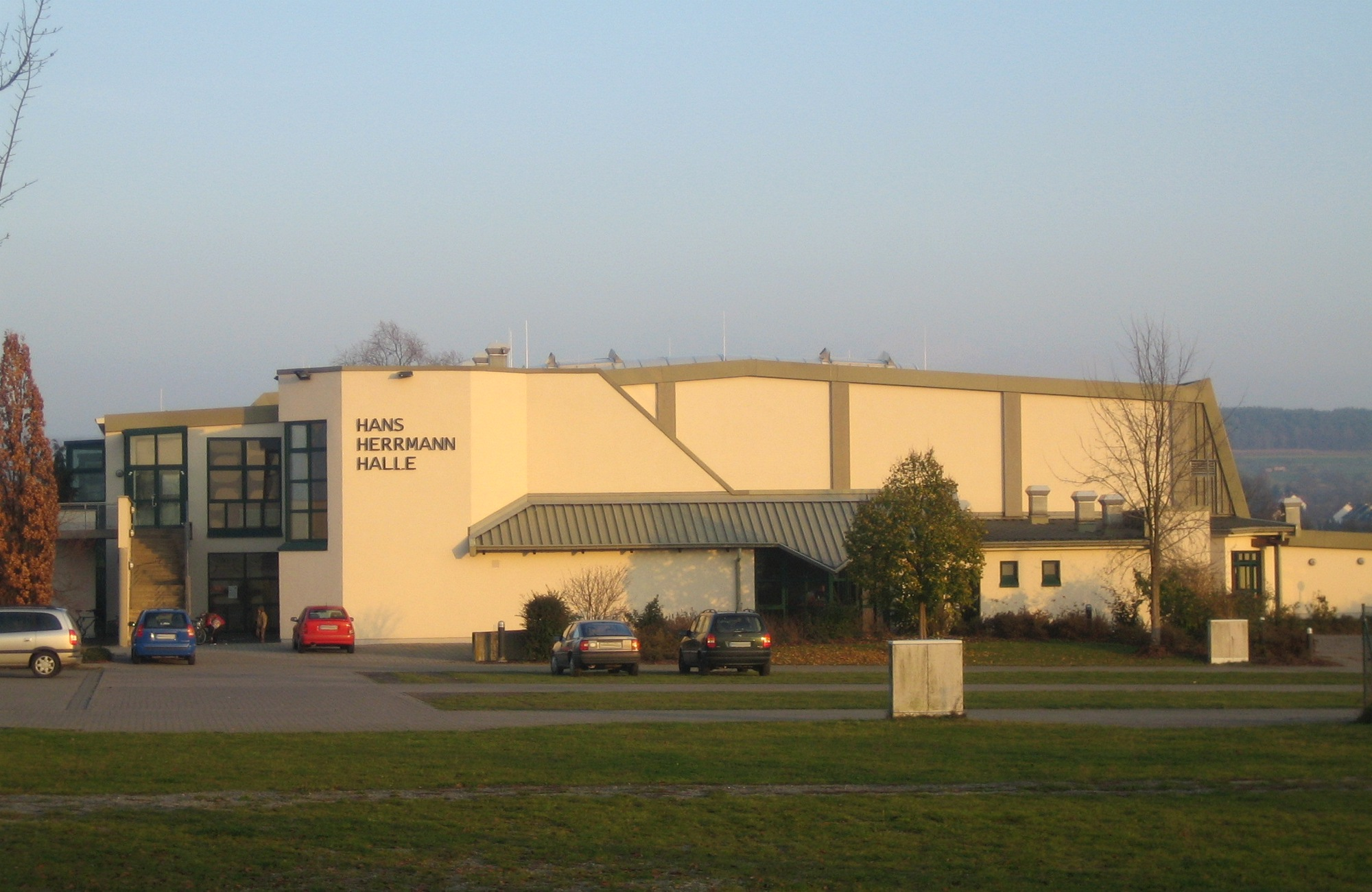 Mehrzweckhalle "Hans-Herrmann-Halle" in Niedernberg, Bayern, Deutschland